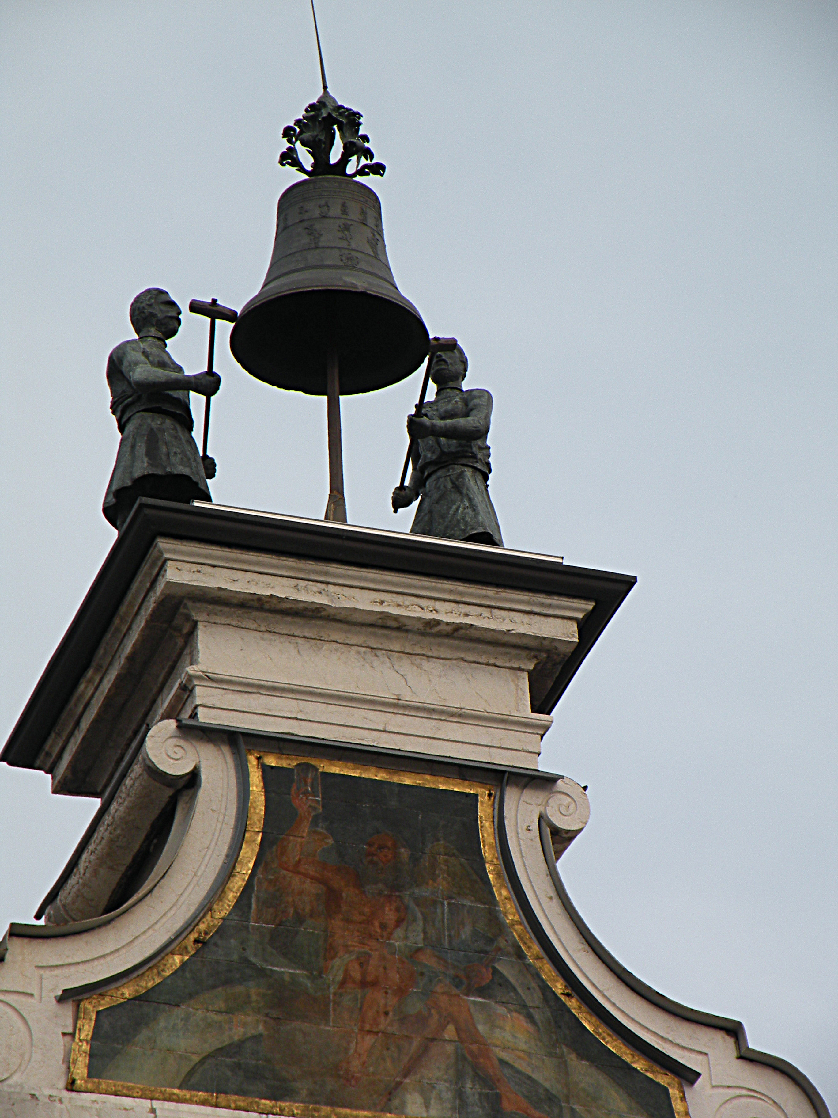 Колокол на часовой башне в Брешии